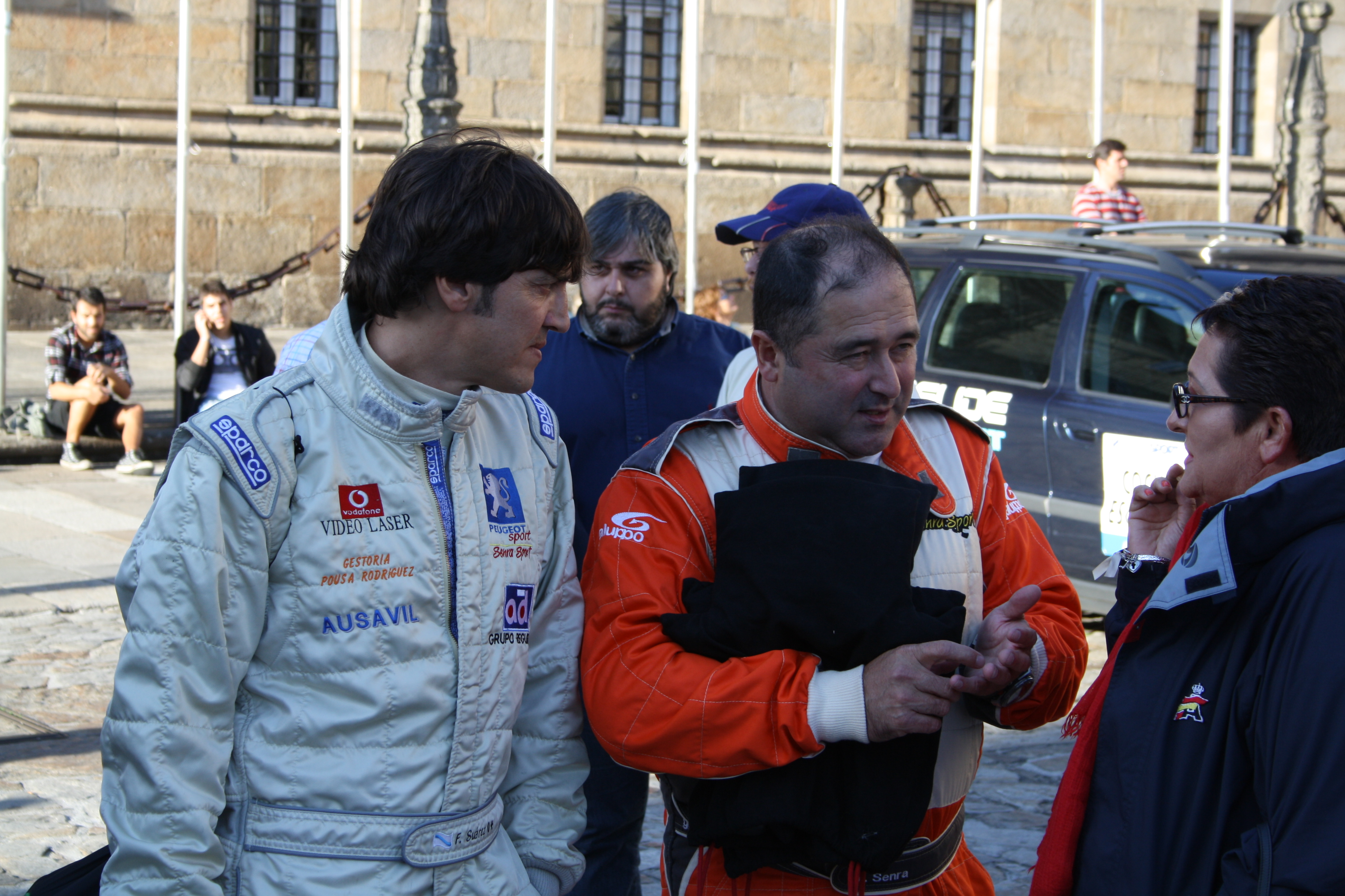 Rally de Galicia Histórico 2012